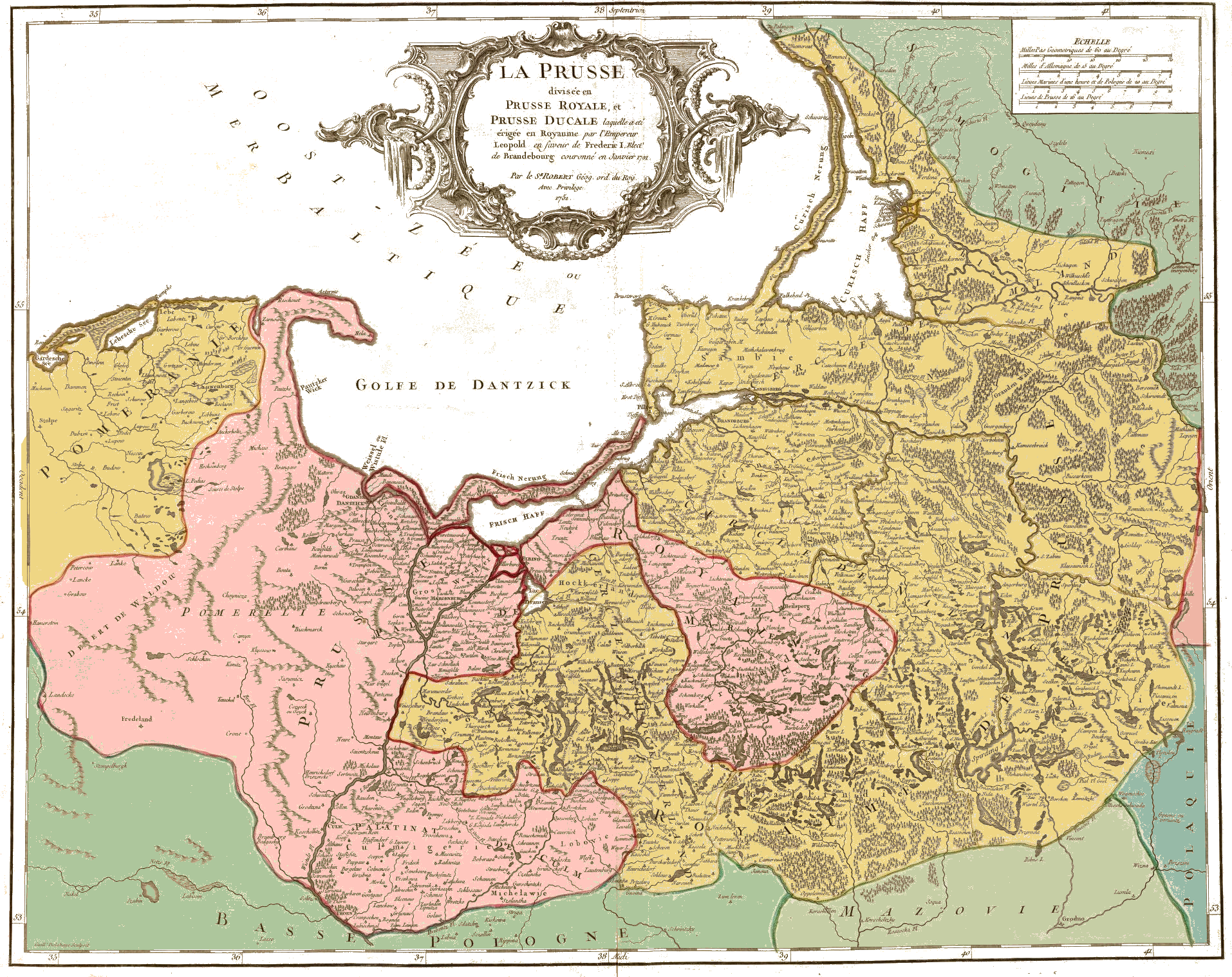 Map of Prussia in 1751, with Royal Prussia (Polish) shown in pink and the Kingdom of Prussia (Brandenburg), formerly Ducal Prussia shown in dark gold.French map caption: “La Prusse, divisée en Prusse Royale, et Prusse Ducale laquelle a été erigée en Royaume par l'Empereur Leopold en favour de Frederic I. Elect. de Brandebourg couroné en Janvier 1701. Par le Sr. Robert Geog. ord. du Roy. Avec Privilege. 1751. Guill. Delahaye, sculpsit.”